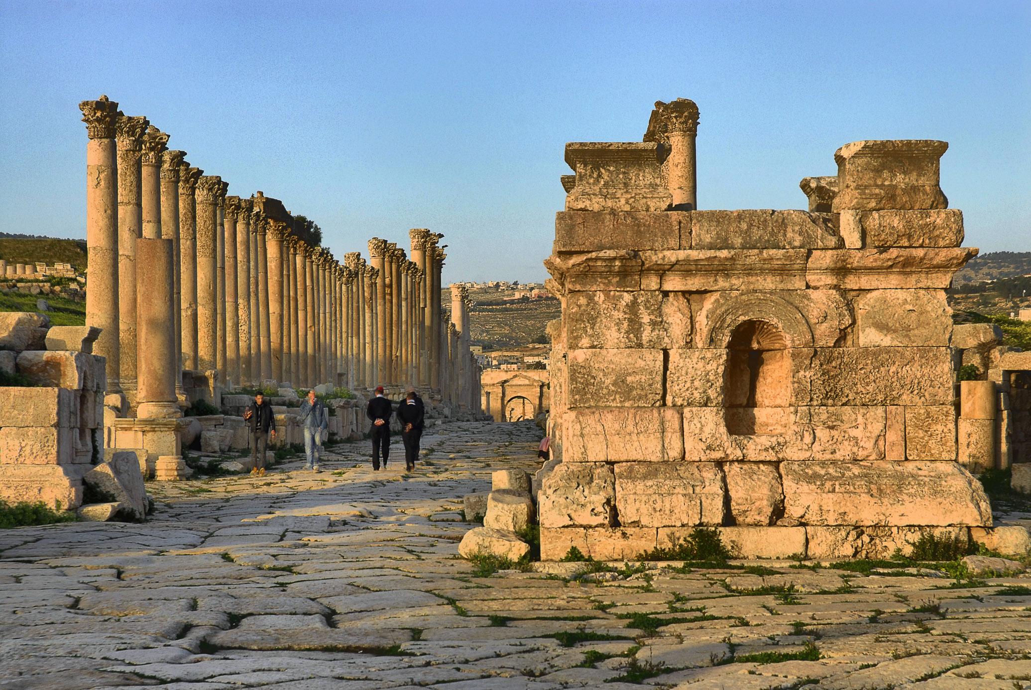 Jerash